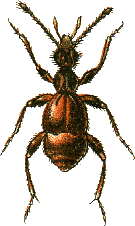 This file has been extracted from another file: Jacobs16.jpg